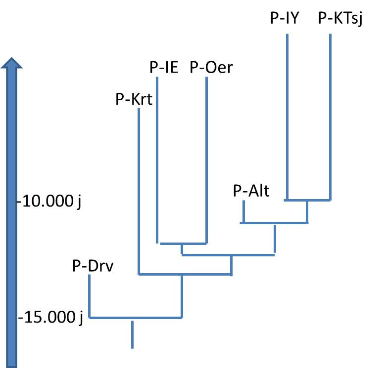 Stamboom Eurazische talen volgens Mark Pagela,b,1, Quentin D. Atkinsonc, Andreea S. Caluded, and Andrew Meadea